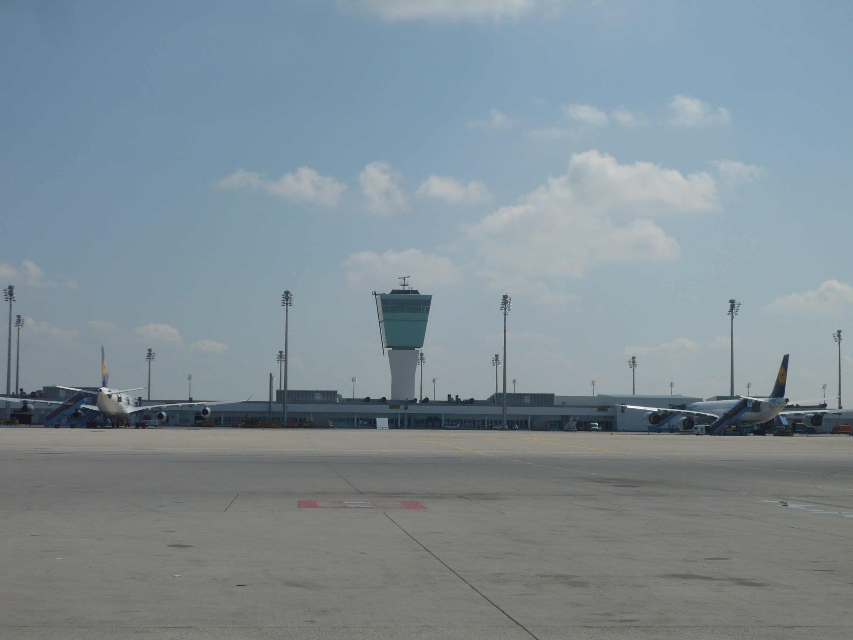 Gepäcksortierhalle zwischen Vorfeld 2 und 3 am Flughafen München Franz Josef Strauß